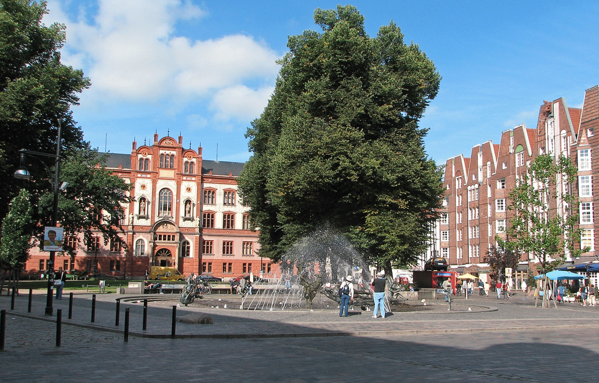 Beschreibung: Universitätsplatz in Rostock / Frontseite / Germany. Im Vordergrund der „Brunnen der Lebensfreude“ von Jo Jastram. Fotograf: Darkone, 17. August 2005